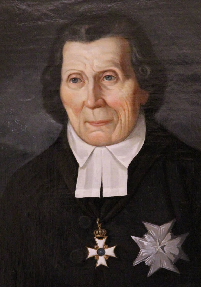 Bishop Eric Hesselgren